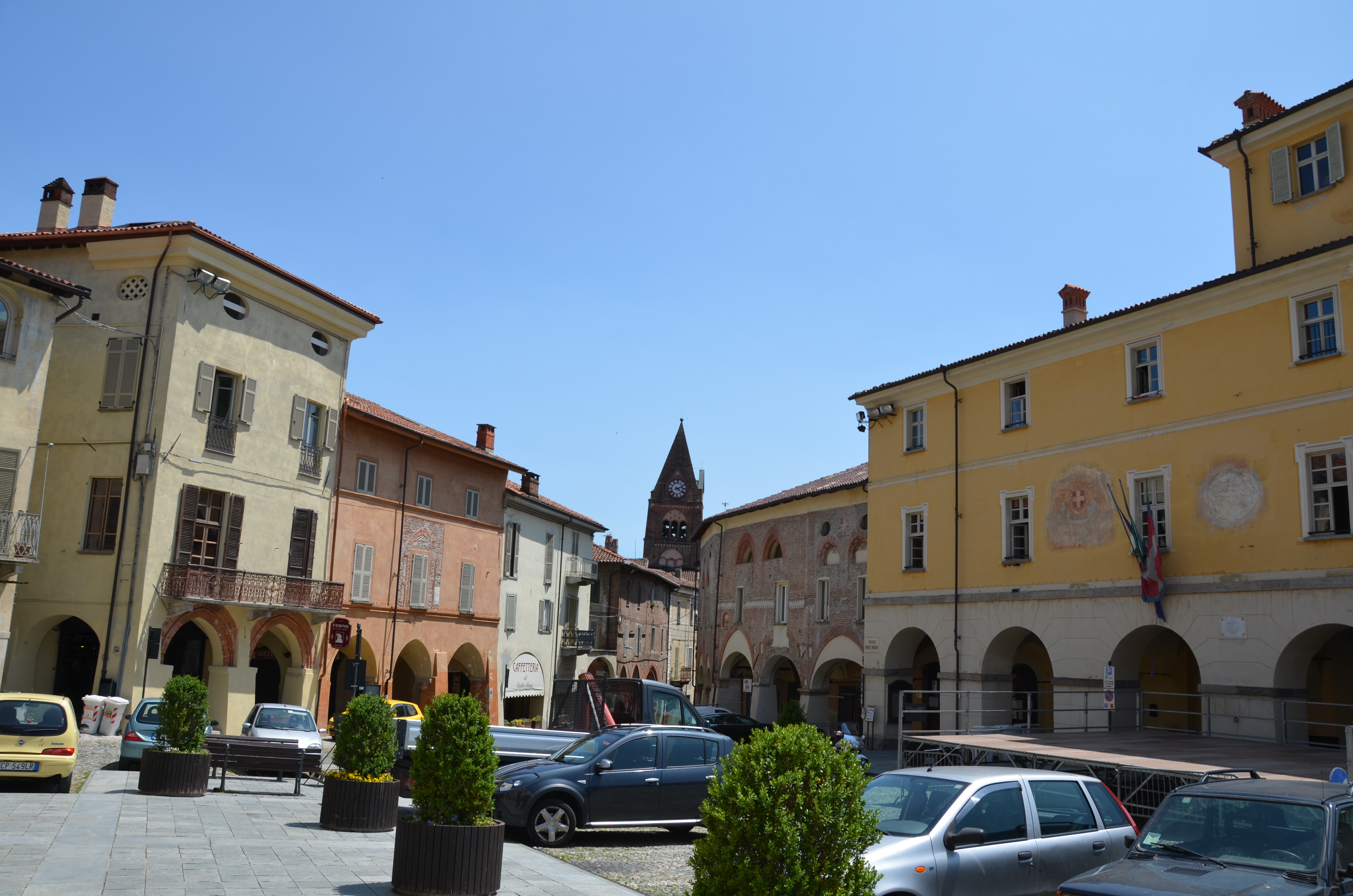 Avigliana - Piazza Conte Rosso